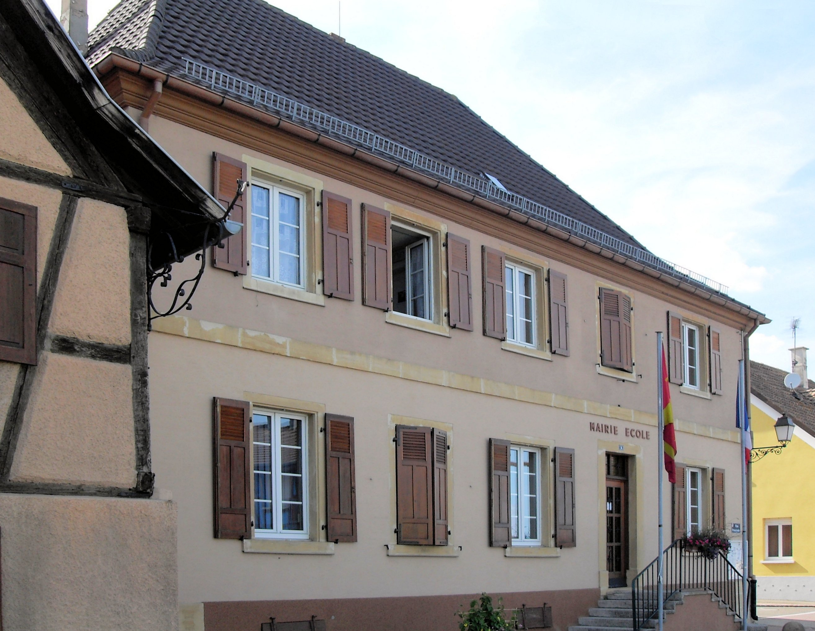 La mairie et l'école de Niederentzen